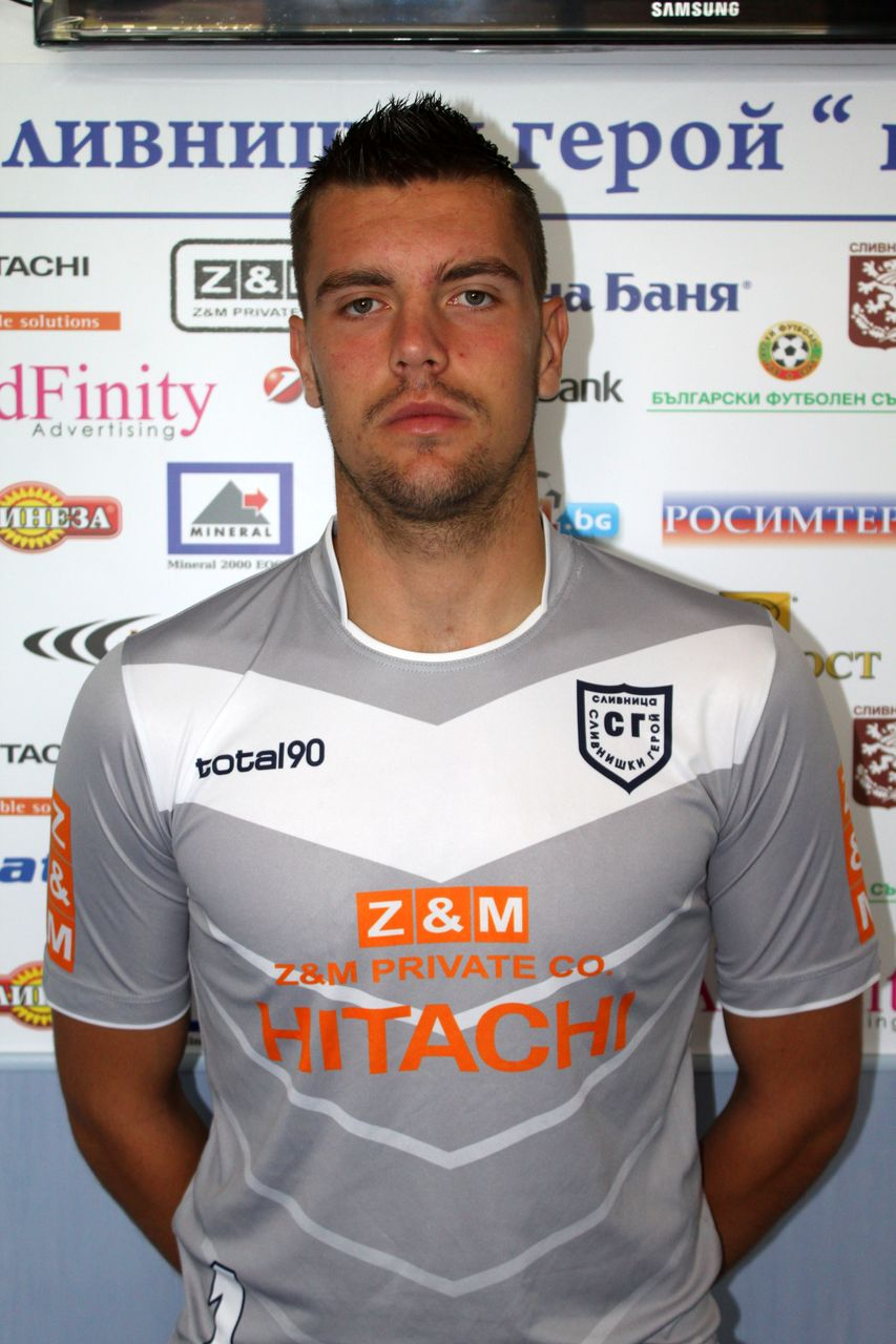 Мартин Луков - български футболист, вратар